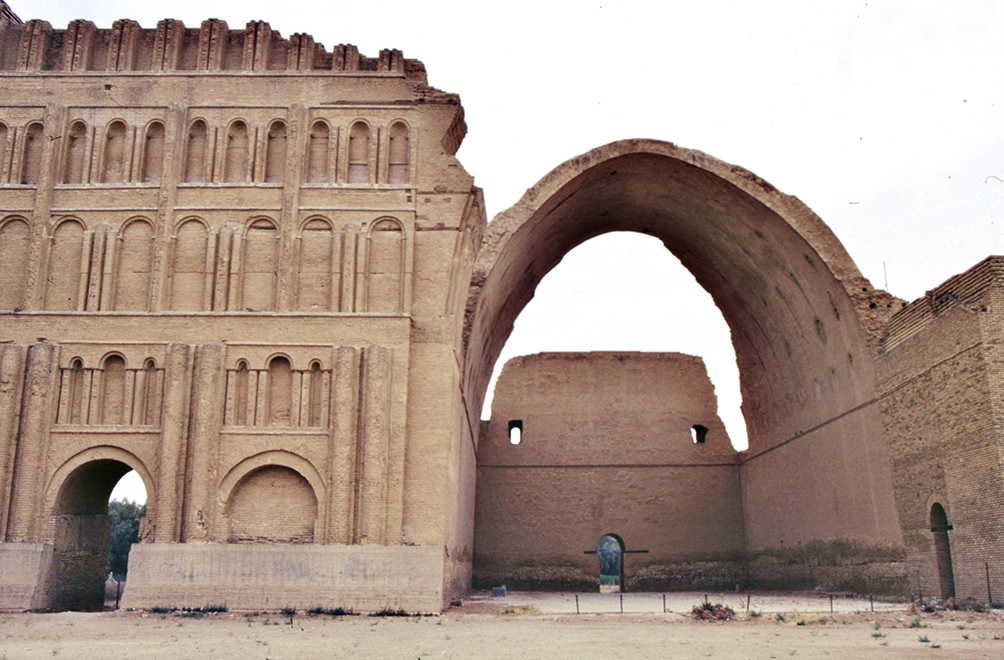 تاق مازه دار در طاق کسری، سبک پارتی و دوره ساسانی